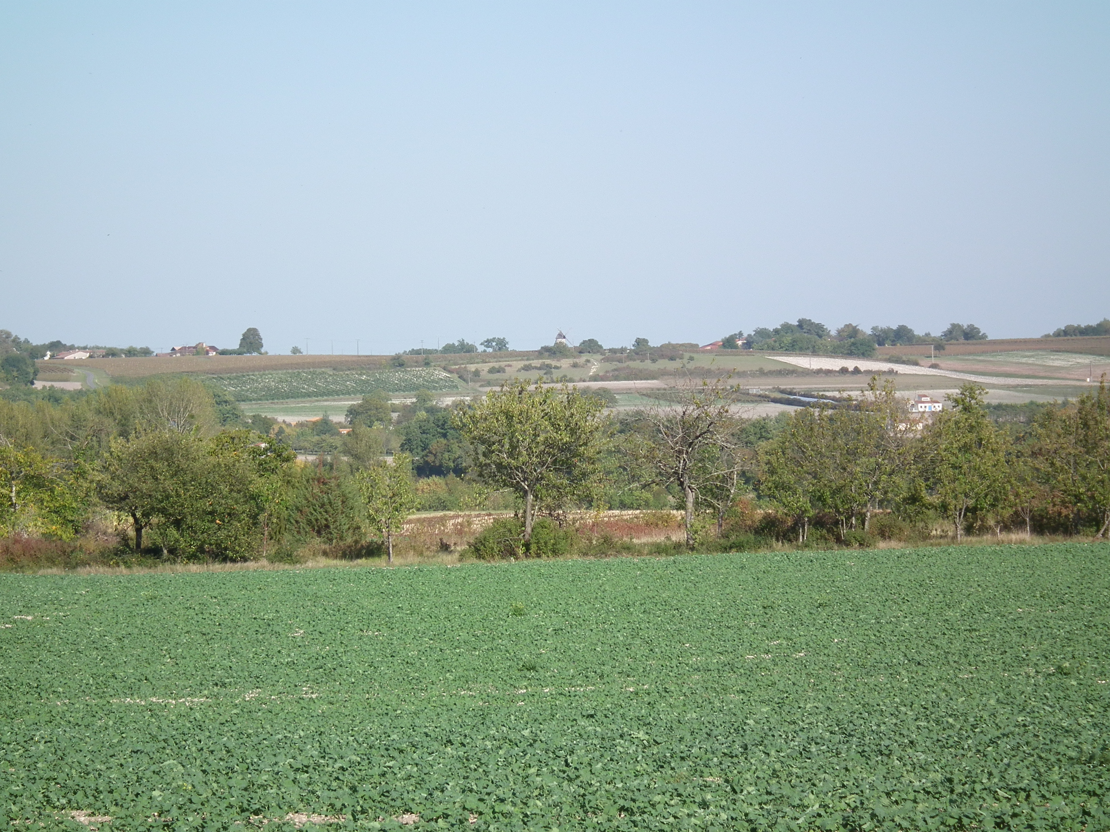 Paysage de champagne aux environs de Jonzac